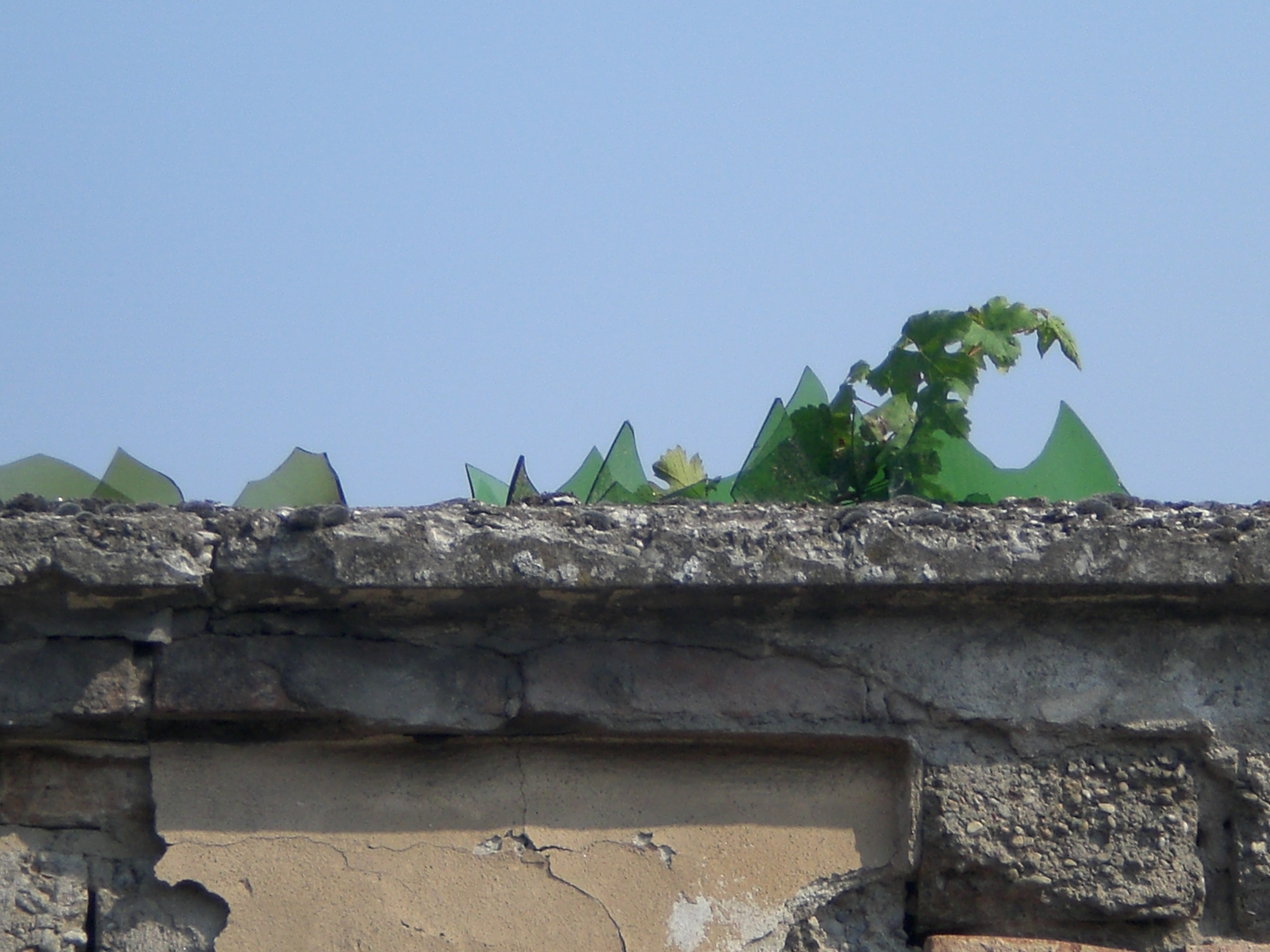 Brisckerly - Opera sua - Izano